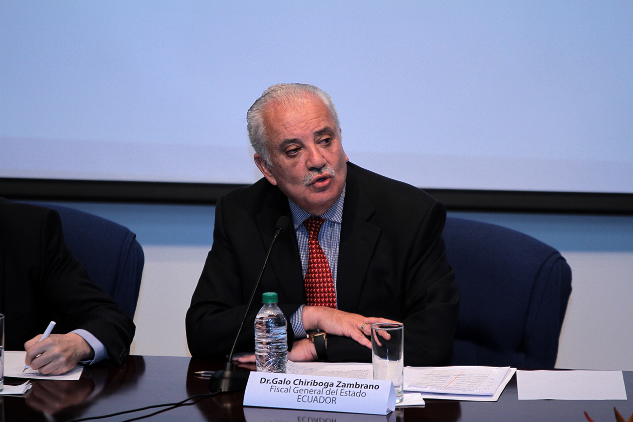 Quito-Ecuador, 8 de dic (ANDES).- El Fiscal General del Estado, Dr. Galo Chiriboga dando la bienvenida a las conferencias ofrecidas por la Fiscalía en la FLCSO Quito.